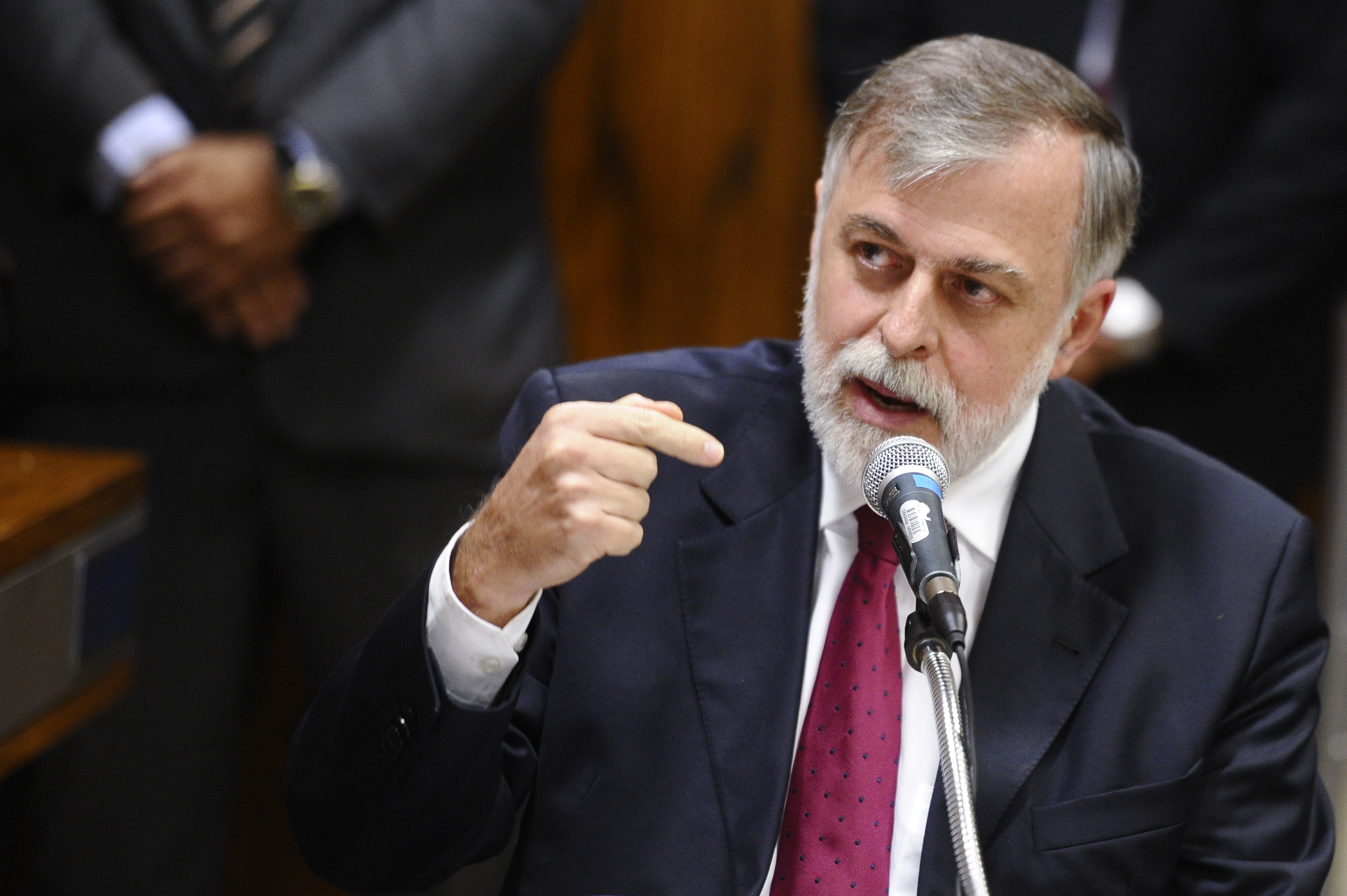 Sala de comissões do Senado para participar da Comissão Parlamentar Mista de Inquérito (CPMI) da Petrobras. CPMI faz acareação entre dois ex-diretores da Petrobras Paulo Roberto Costa e Nestor Cerveró. O objetivo, conforme o requerimento do deputado Ênio Bacci (PDT-RS), é confirmar as acusações feitas por Paulo Roberto Costa contra Cerveró, quando ele depôs à Polícia Federal, no inquérito da Operação Lava Jato. De acordo com publicações na imprensa, Costa teria dito, em depoimentos, que Cerveró recebeu propinas em contratos da Petrobras. Em pronunciamento, ex-diretores da Petrobras Paulo Roberto Costa. Foto: Jefferson Rudy/Agência Senado